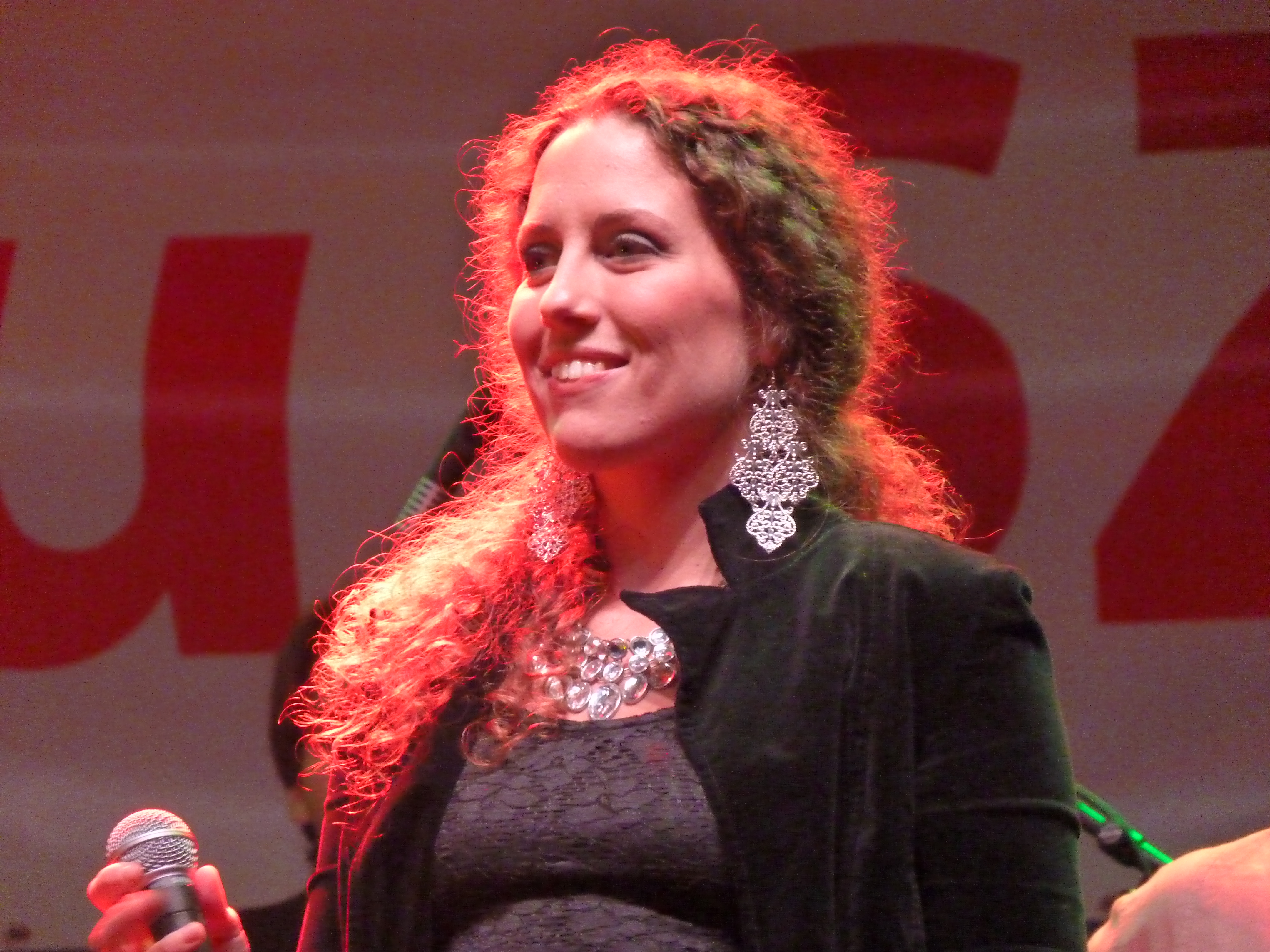 A felvétel 2014. szeptember 12-én, pénteken készült Budapesten, a 23. Budavári Borfesztiválon. Nagyszínpad, a Makám együttes és vendégei. Az együttes tagjai: Krulik Zoltán - gitár Korzenszky Klára - ének Kuczera Barbara – hegedű, vokál Boros Attila - basszusgitár Eredics Dávid - fúvós hangszerek Keönch László - ütőhangszerek Mohai György - hangmérnök ( Szalóki Ágnes, Lovász Irén. Bognár Szilvia: Katona sirató KATONA SIRATÓ MAKÁM BOGNÁR SZILVIA MIHI 2014 Források Bor és Pia borpiaci szakmai magazin 2014. augusztus Borfesztivál Melléklet 23. Budavári Borfesztivál kiállítási tájékoztató ©© Derzsi Elekes Andor, Budapest, 2014, A kép és filmfelvételek egészben, vagy részletekben másolását, bármilyen úton történő sokszorosítását és felhasználását a szerző ellenérték nélkül, jogutódjaira is kihatóan megengedi. Az engedély kiterjed a kereskedelmi célú hasznosításra is. Kéri azonban nevének feltüntetését a felhasználás során. A Metapolisz sorozat valamennyi képe és filmje Creative Commons alatti valamint kereskedelmi - for profit - célra is felhasználható. Ajánlott hivatkozás: Derzsi Elekes Andor: Metapolisz DVD line